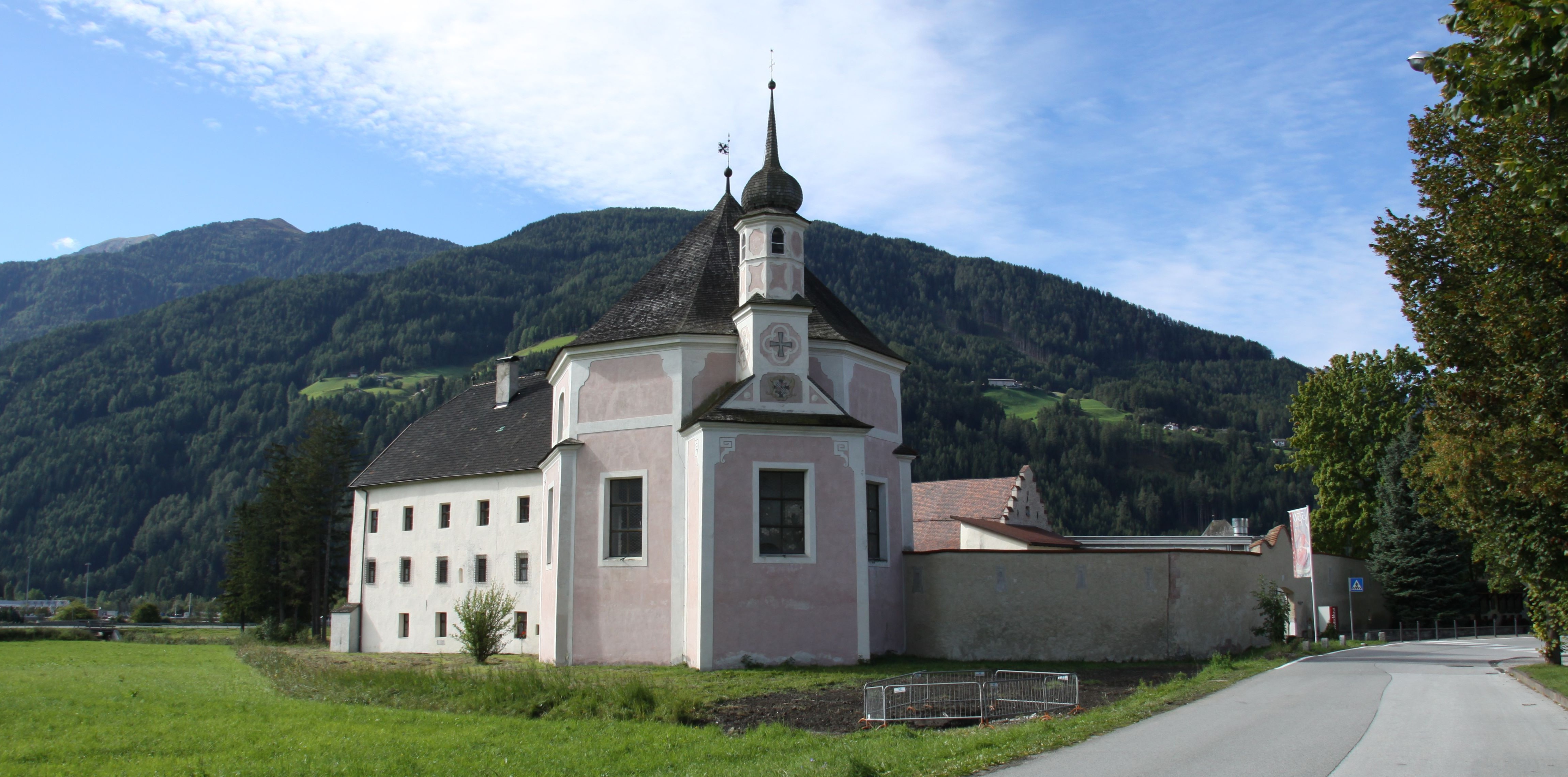 Sterzing Kommende des deutschen Ritterordens